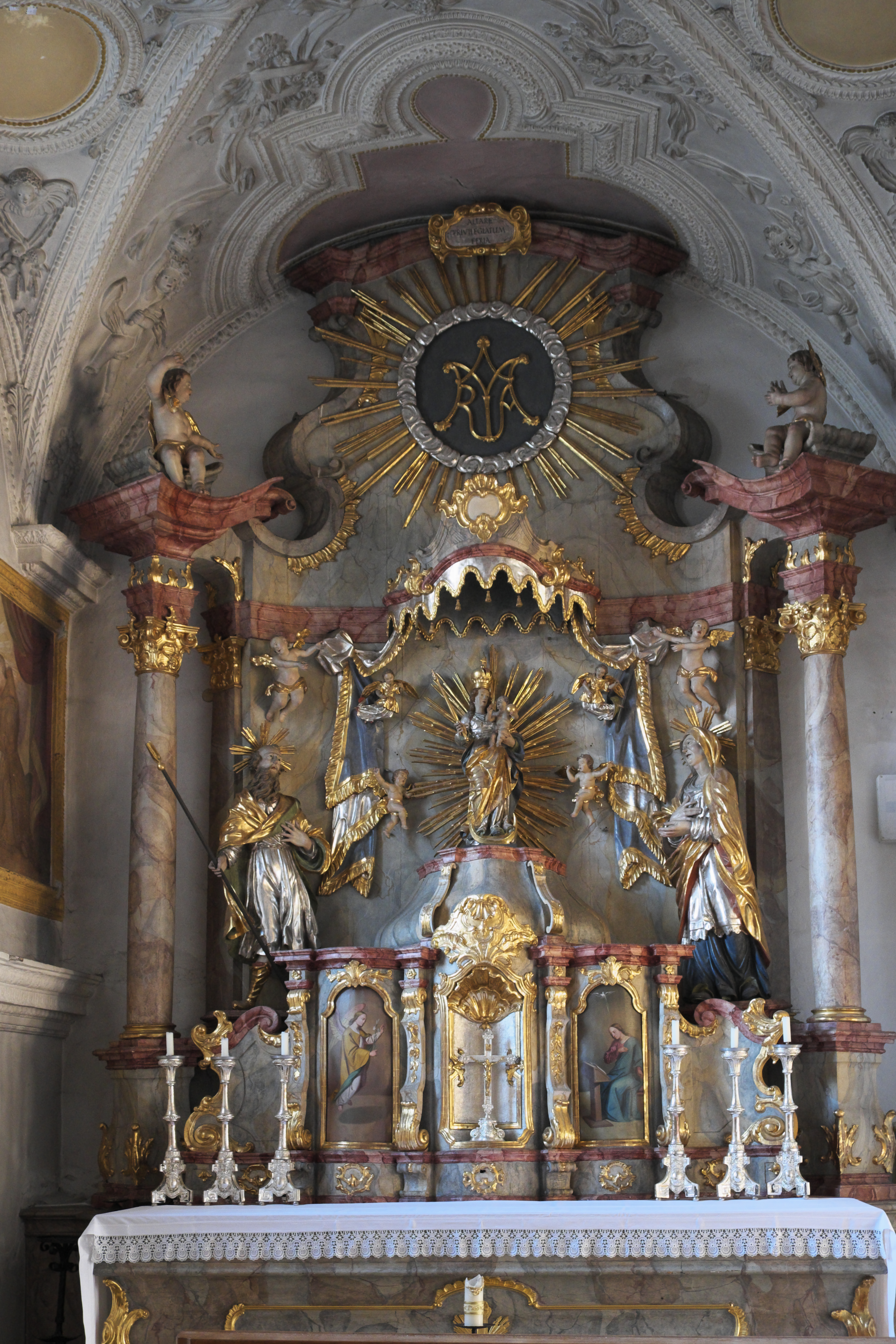 Katholische Pfarrkirche Mariä Himmelfahrt in Essenbach im Landkreis Landshut (Bayern/Deutschland), Marienaltar